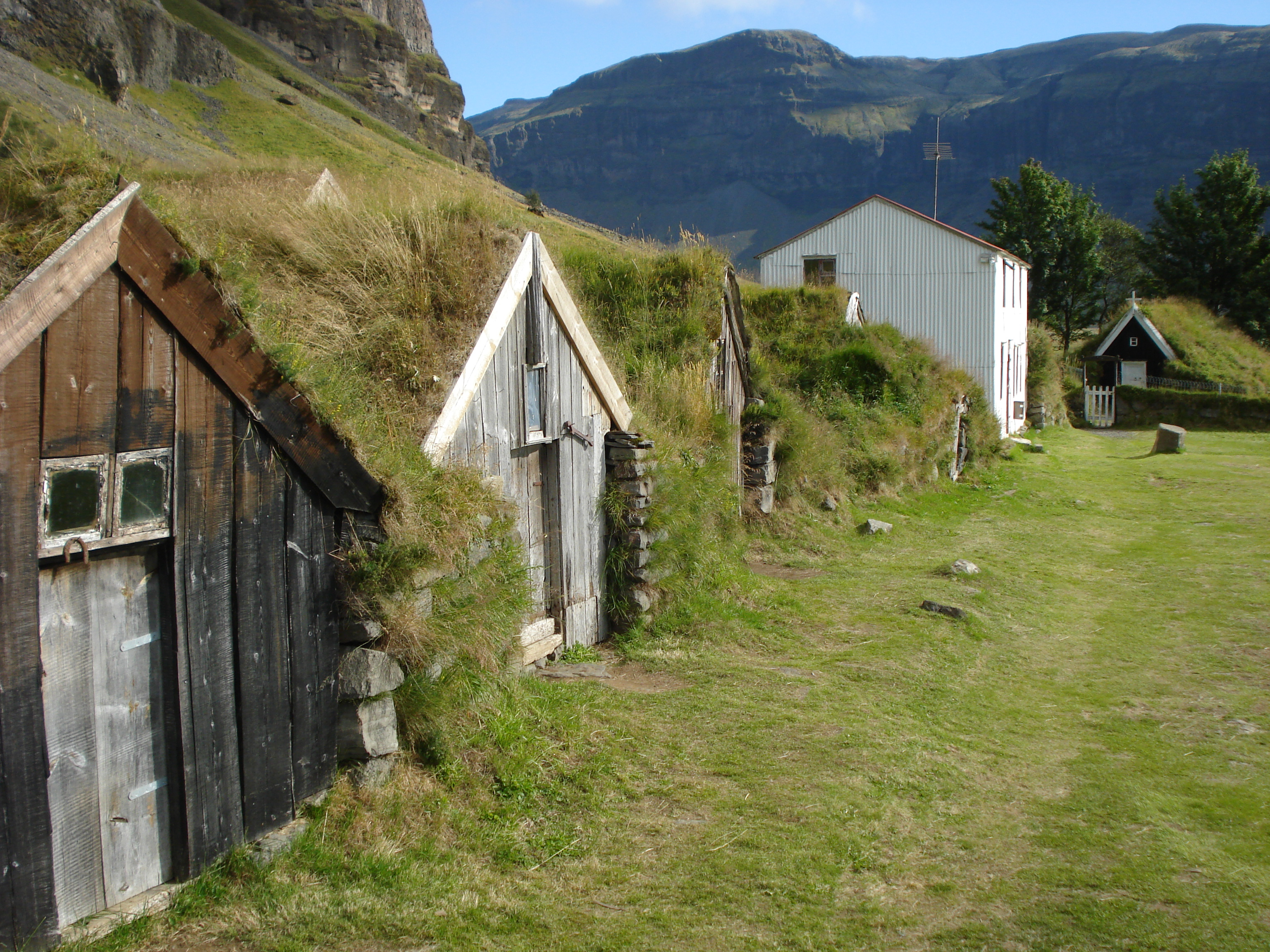 Bænhúsið á Núpsstað